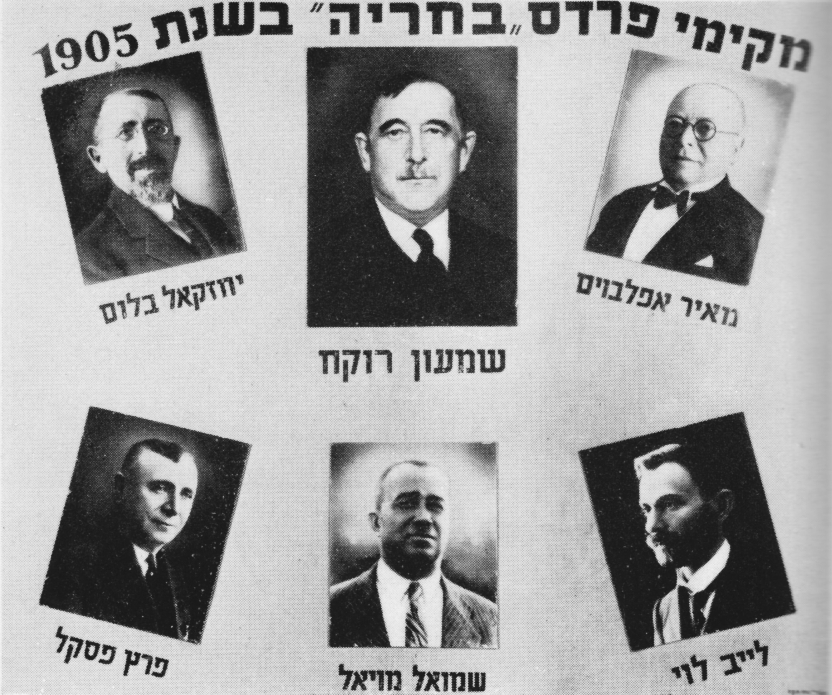 מקימי פרדס "בחריה"